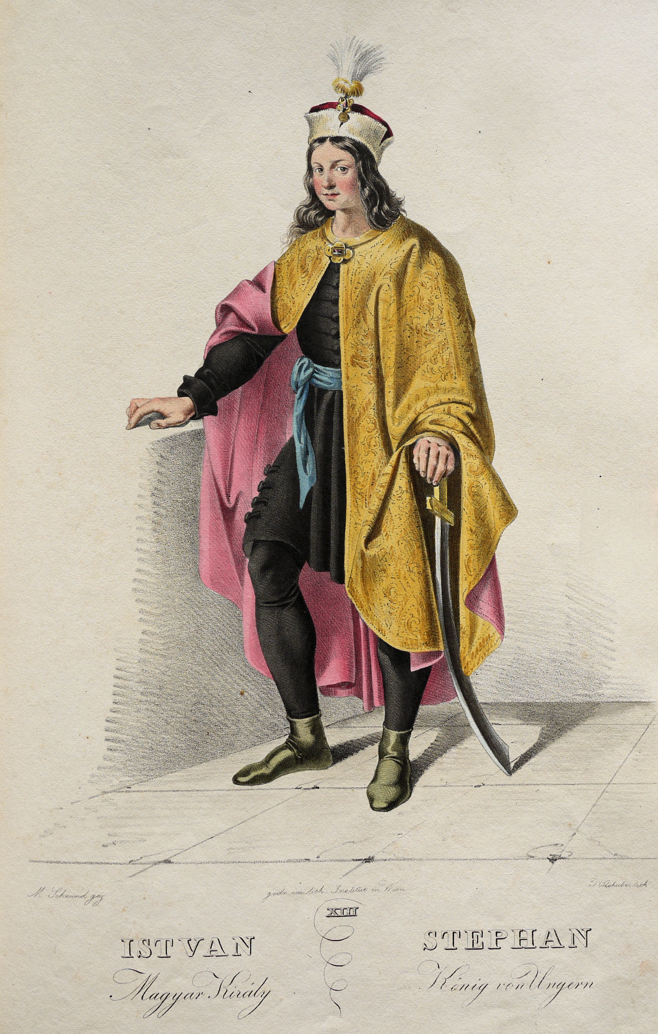 Stephan III. (1147-1172), König von Ungarn etc. Lithographie von Josef Kriehuber nach einer Zeichnung von Moritz von Schwind aus Ungerns Erste Heerführer Herzoge und Koenige In einer Reihe von Bildnissen von Bela bis auf Seine Majestät Franz I. Kaiser Von Österreich König Von Ungern &c., &c. Wien : Lithographisches Institut ;ca. 1828.